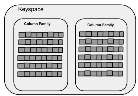 Монгол: fgh